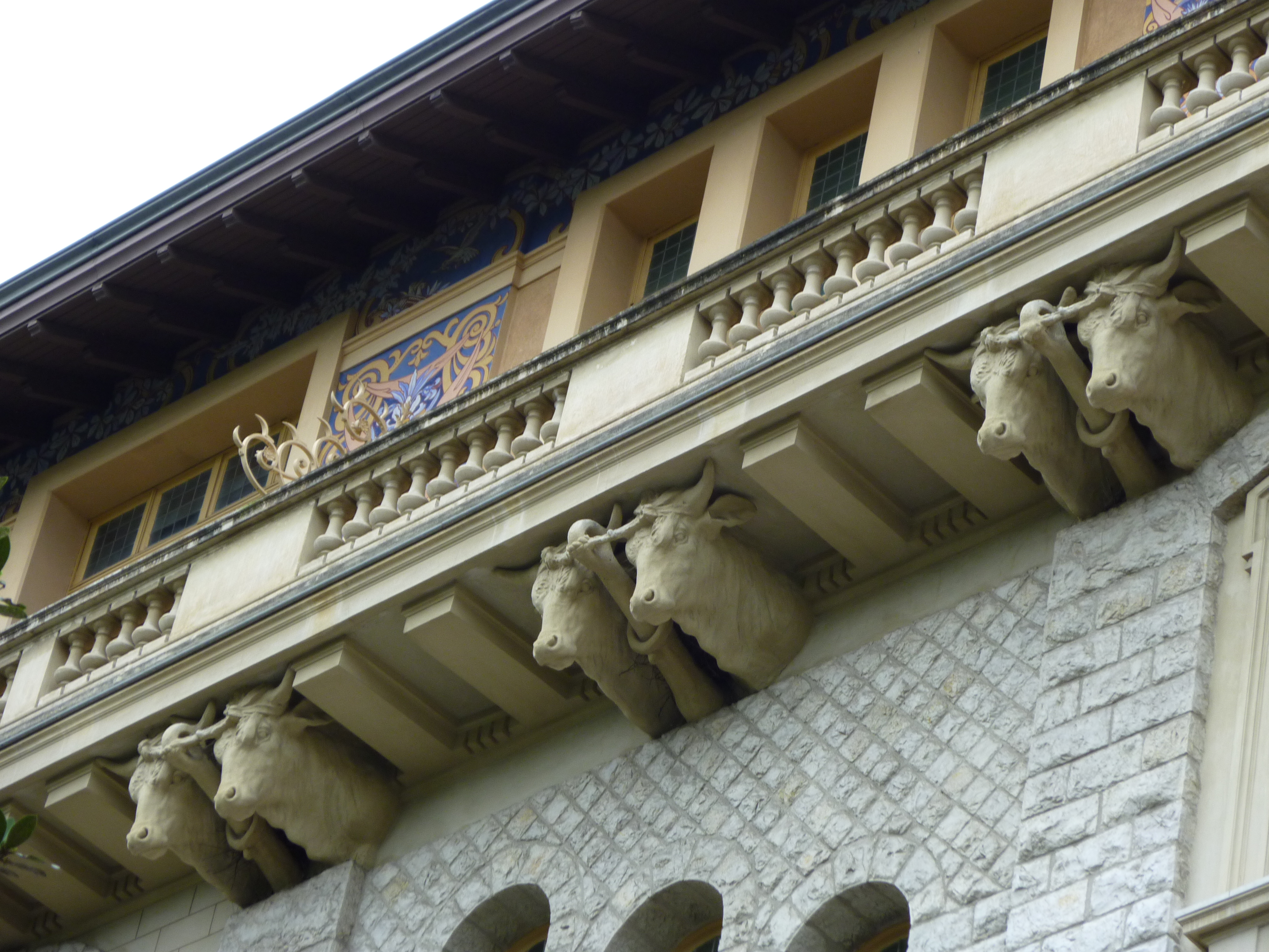 Détail de la façade du Palais Baréty (Nice, Alpes-Maritimes, France) .